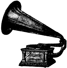 Vevgrammofon av tidig 1900-talsmodell